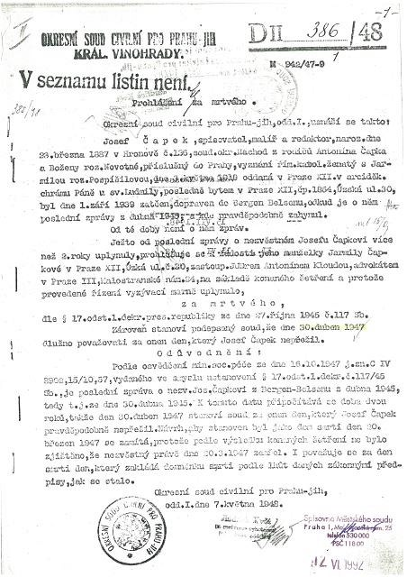 Prohlášení Josefa Čapka za mrtvého vydané Okresním soudem civilním pro Prahu-jih dne 7. května 1948